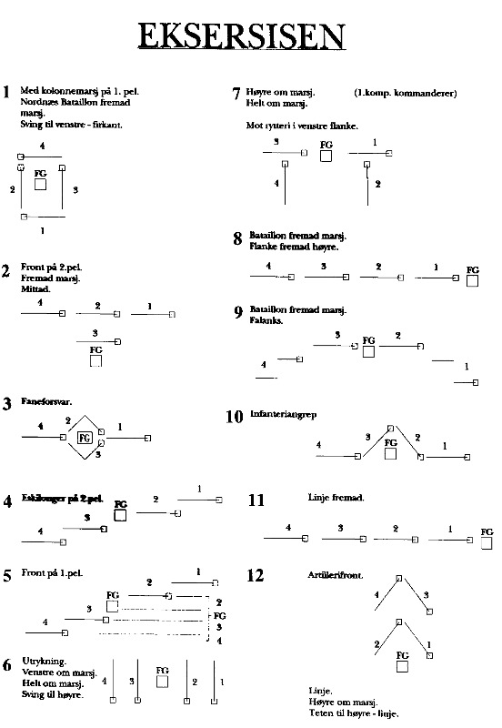 Eksersisen til buekorps, Nordnæs Bataillon.